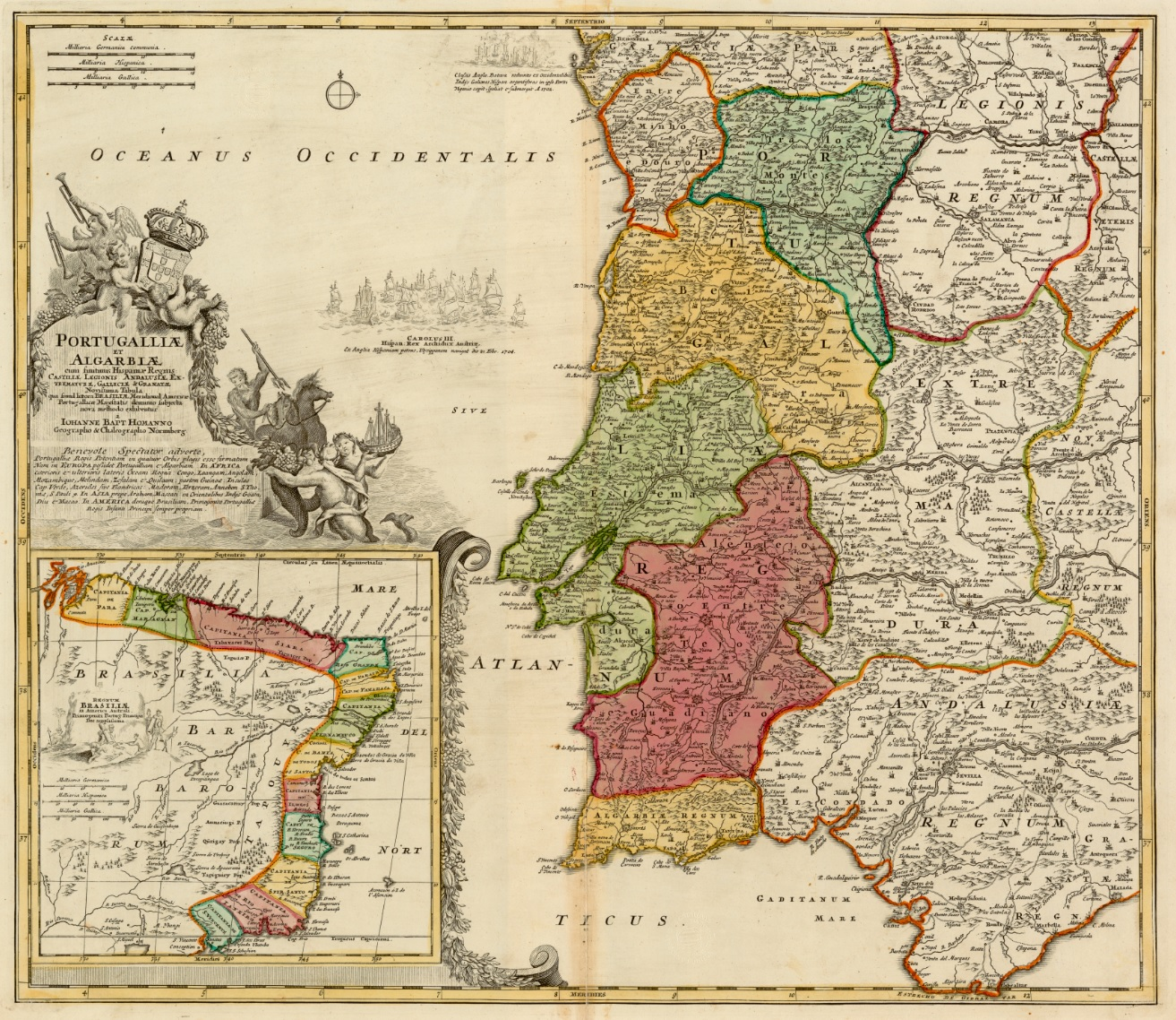 Mapa de 1710 que muestra las divisiones administrativas del Reino de Portugal y del Algarve, así como del Reino de Brasilo dependiente del rey portugués